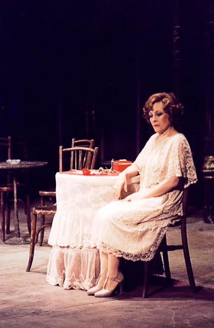 Representacion de la obra de teatro "La Vieja Señorita del Paraiso" de Antonio Gala